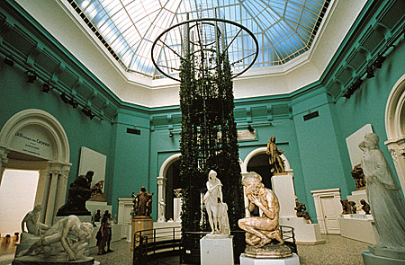 Musée des Beaux-Arts de Valenciennes (59). Cliché mis à disposition par le Comité de Tourisme du Nord publiable moyennant mention du crédit